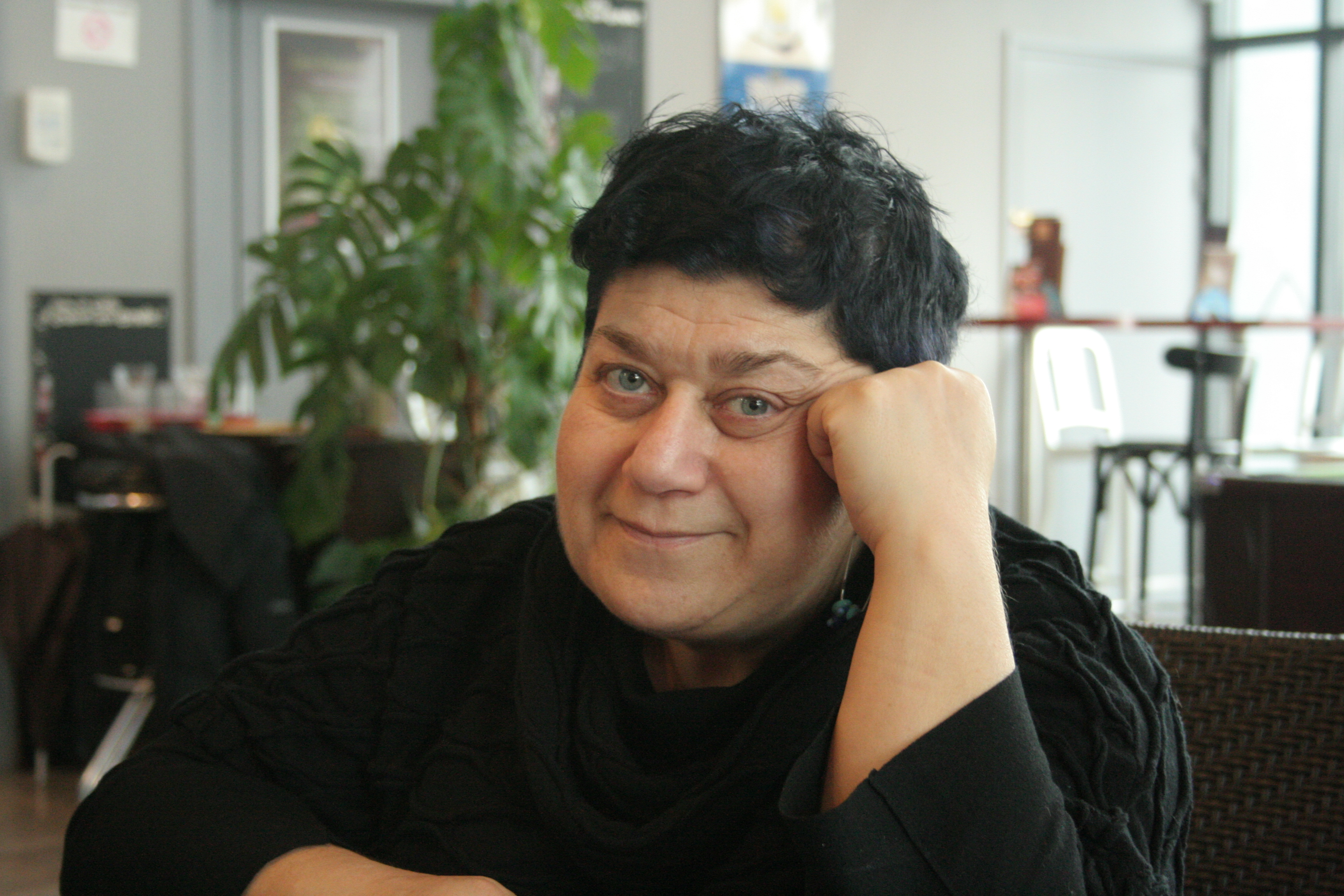 Serra Yilmaz, Festival international des cinémas d'Asie 2010 Vesoul France